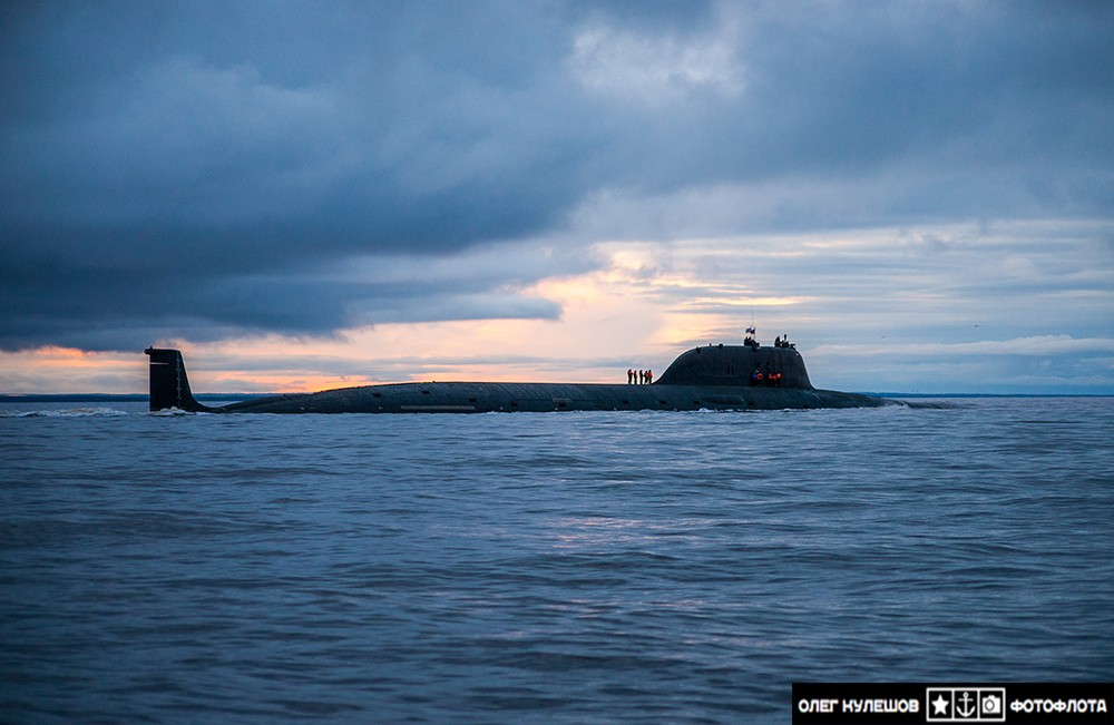 атомная подводная лодка многоцелевая